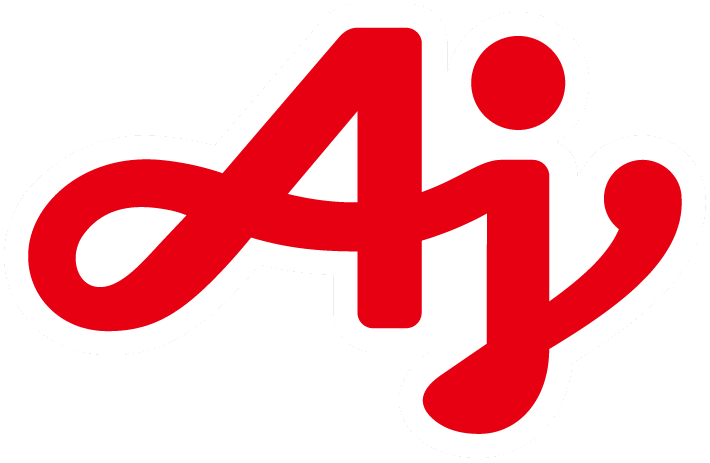 味の素社の社章